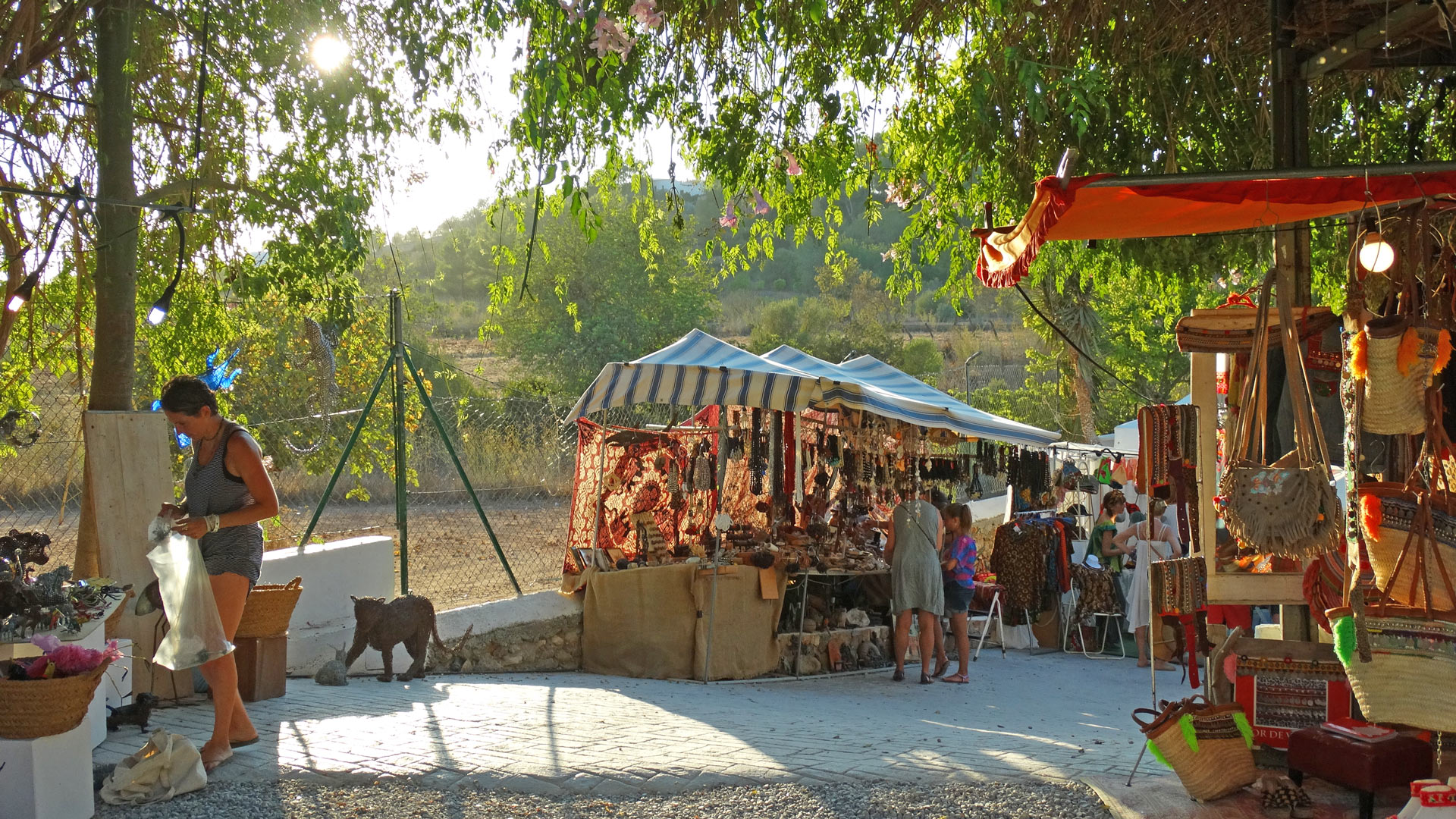 Mercadillo Hippy de Las Dalias en Sant Carles, Ibiza.